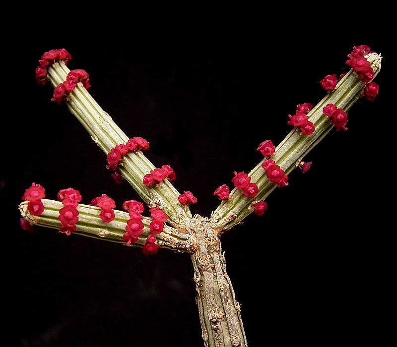 Euphorbia cryptospinosa